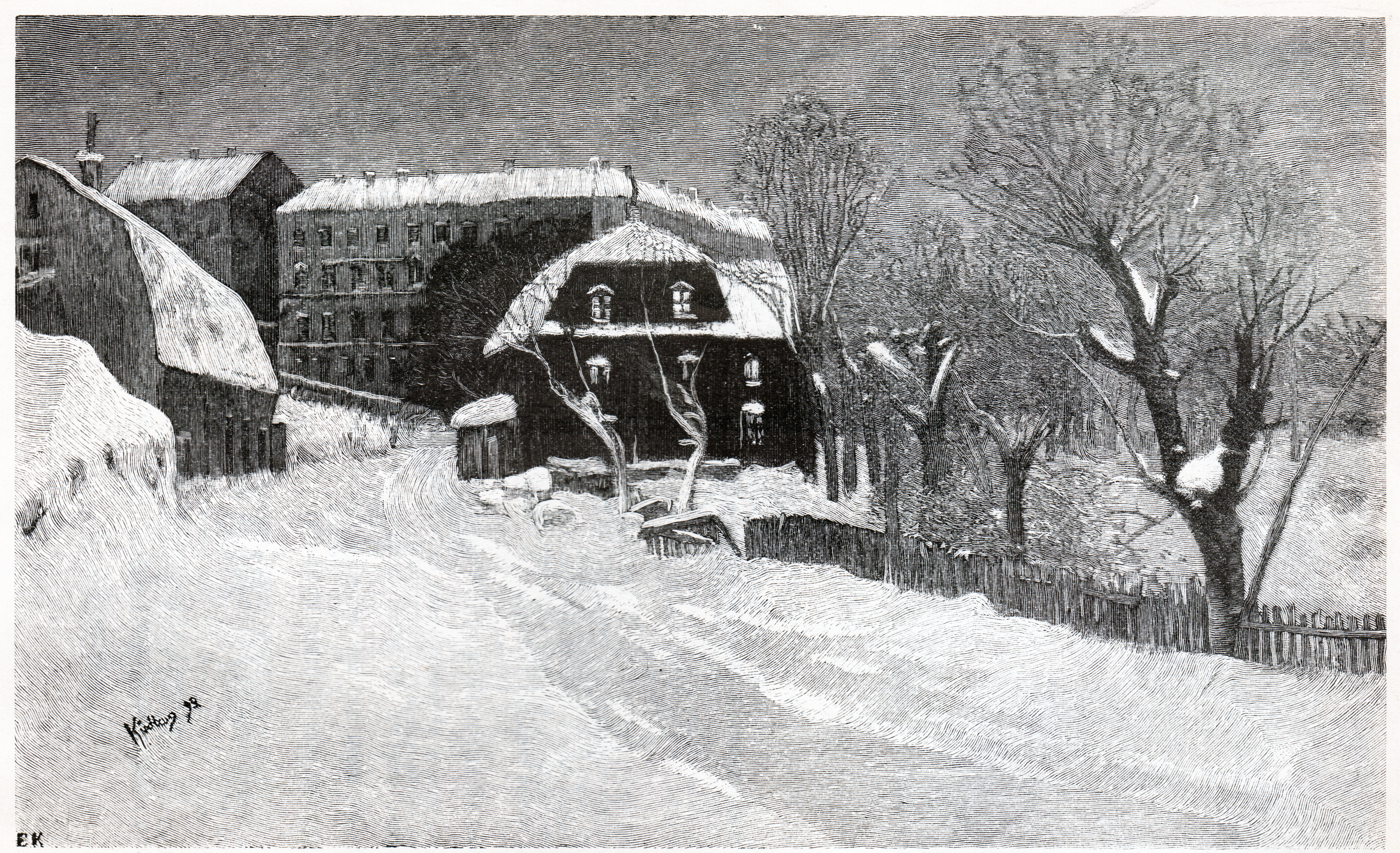 Motiv från Zinkensdamm.Varia. Illustrerad månadsskrift (1898-1908)